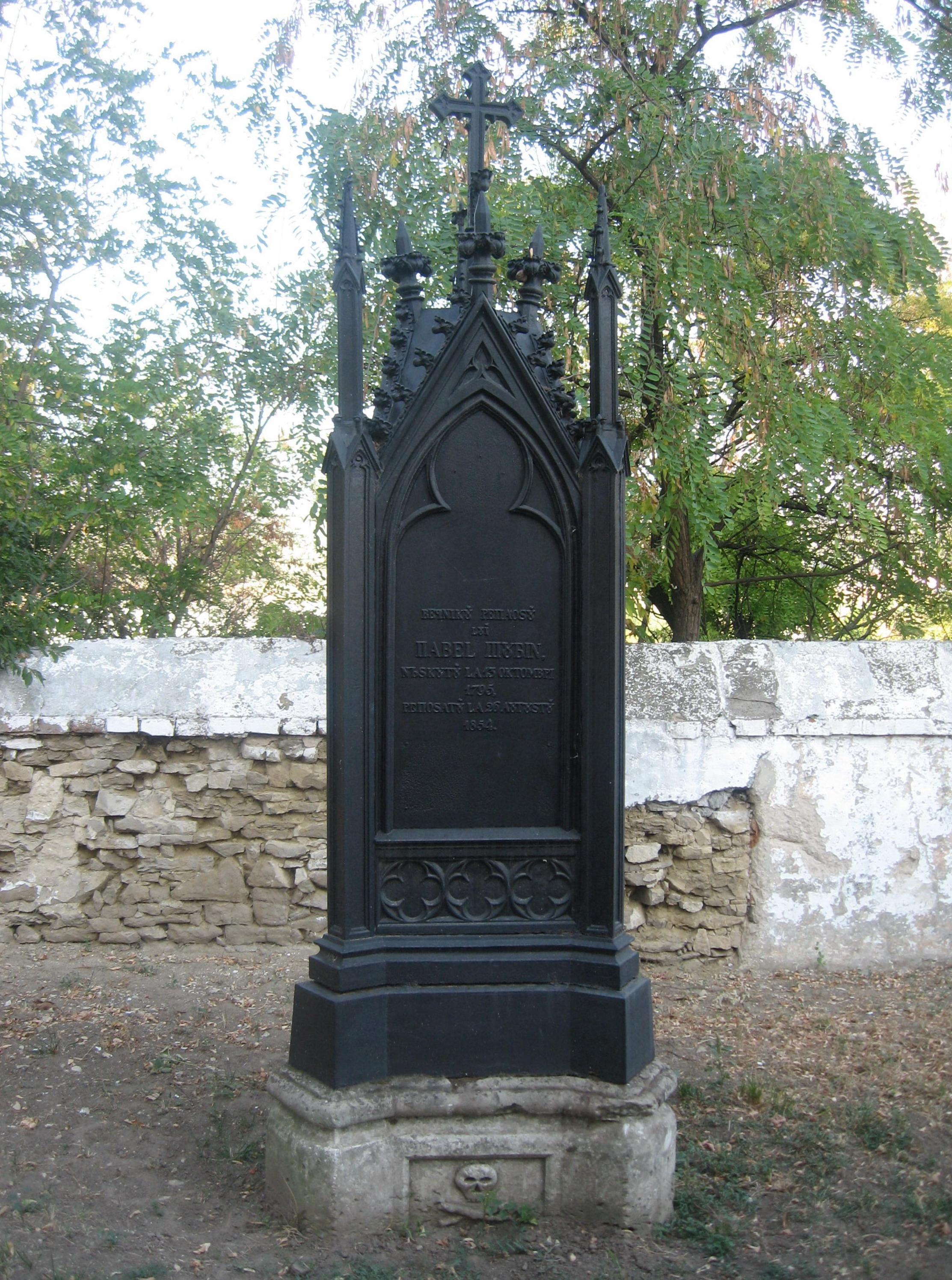 Monumentul funerar Pavel şi Elena Şubin din Vaslui